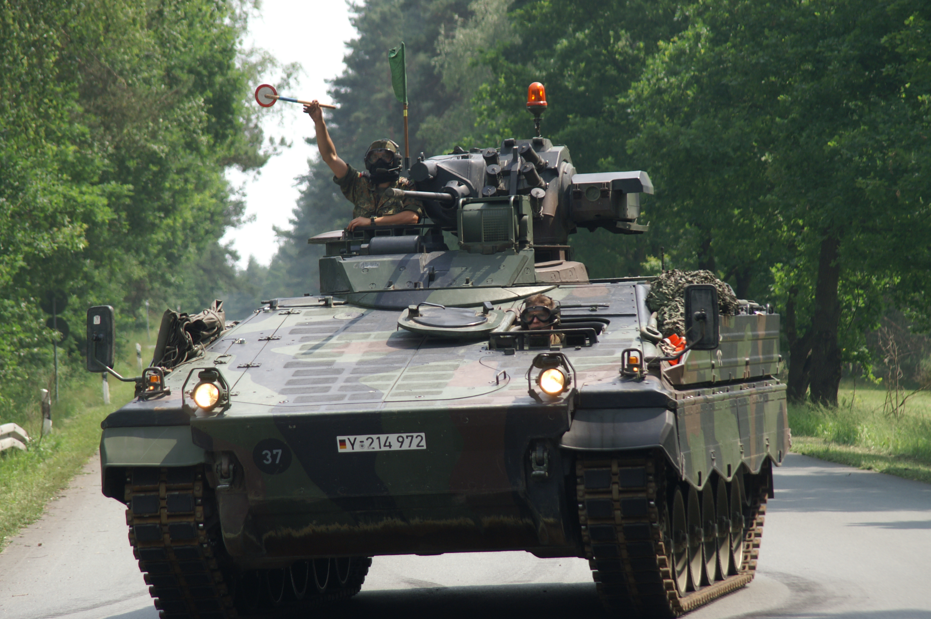 SPz Marder auf dem Truppenübungsplatz Munster